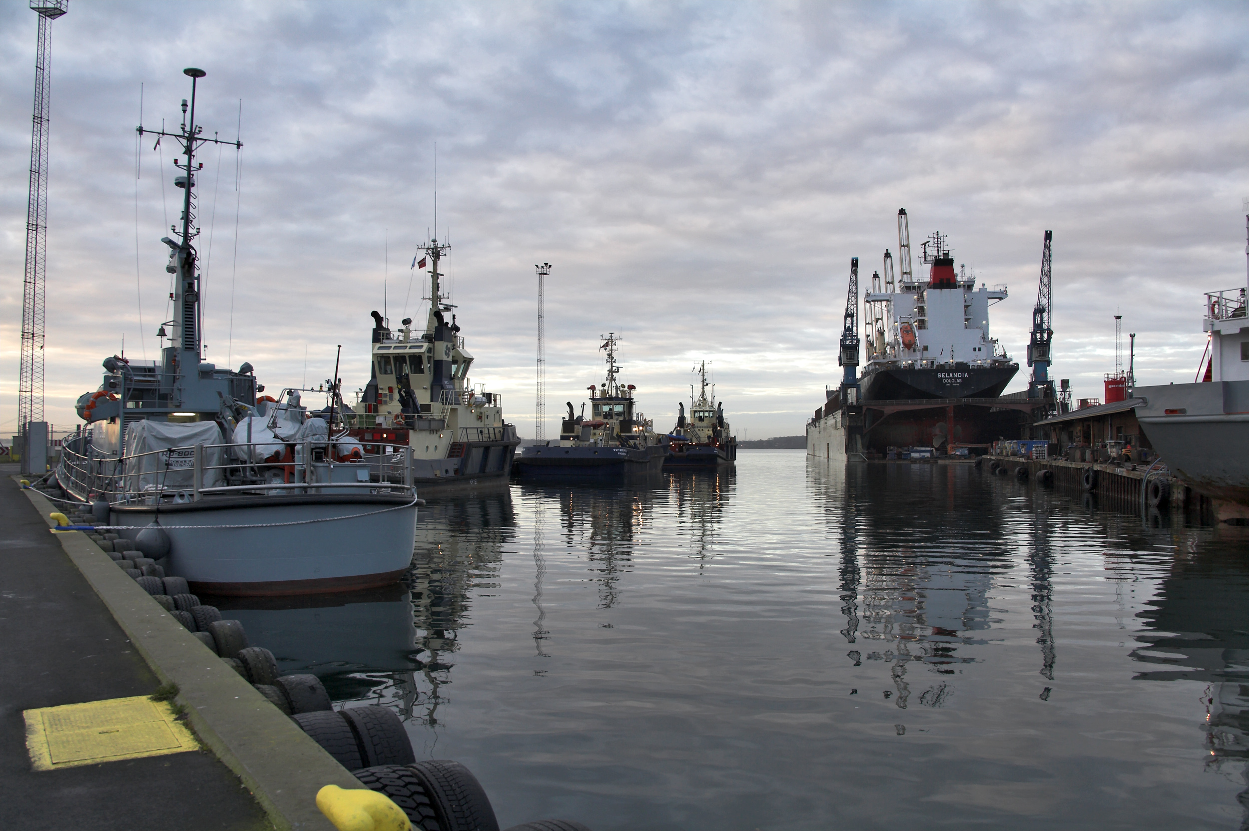 Fredericia Havn